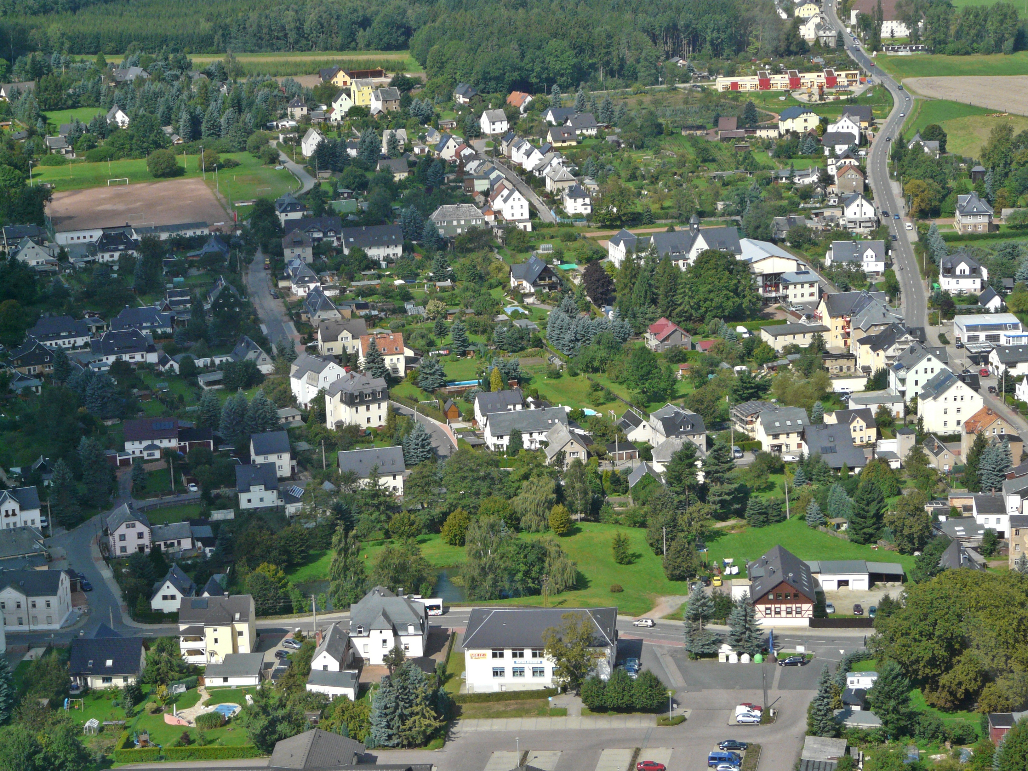 Neuwürschnitz